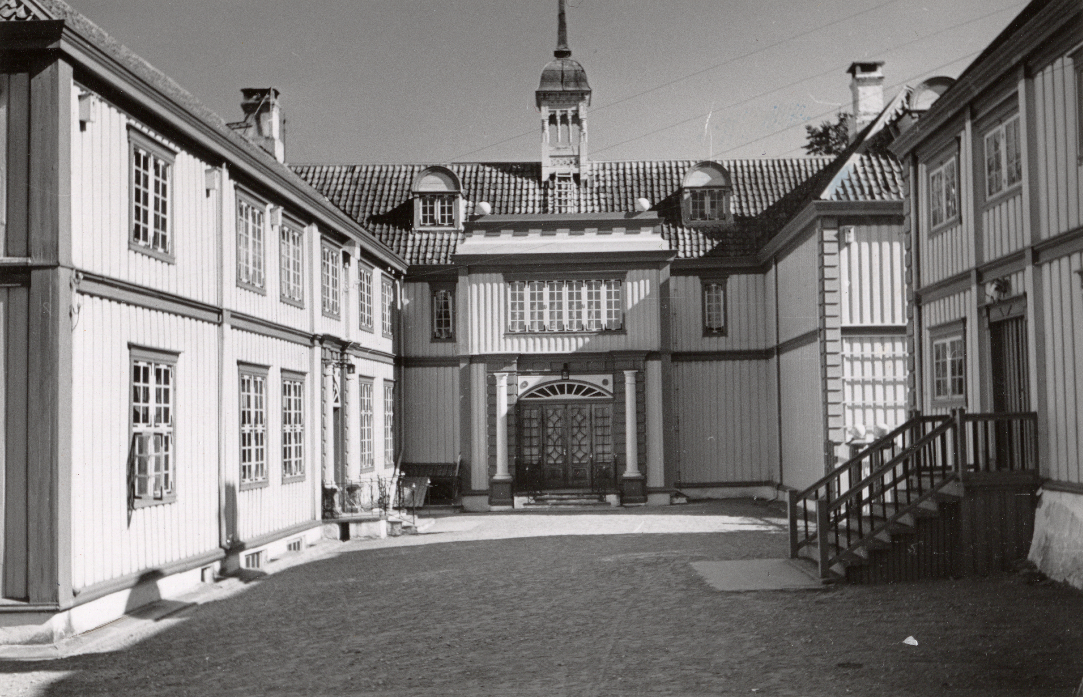 Leangen Nordre i Strinda, Sør-Trøndelag This image on crowdsourcing geotagging platform Fotodugnad